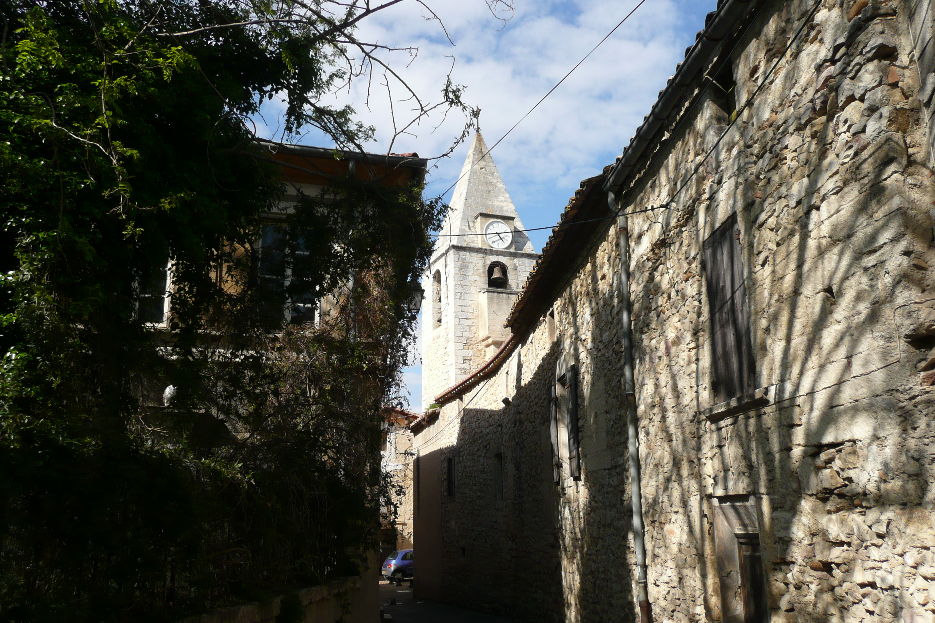 Eglise à Saze.